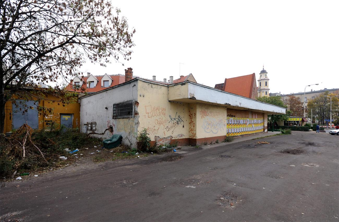 Plac Wróblewskiego 1 - tu chyba był sklep spożywczy. Takie "klimaty" mamy w samym centrum Wrocławia.